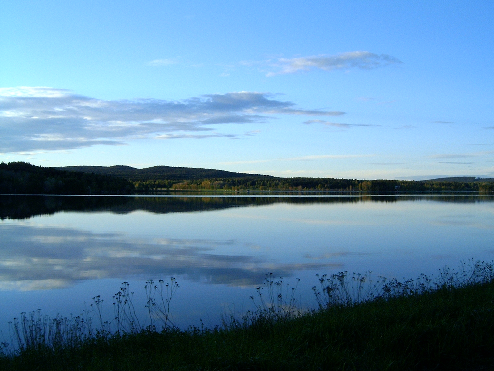 Hosjön ("Lake Ho"?) a spring evening.